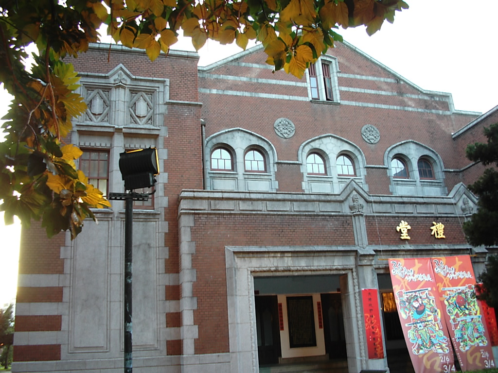 中文（台灣）: 國立臺灣師範大學禮堂。